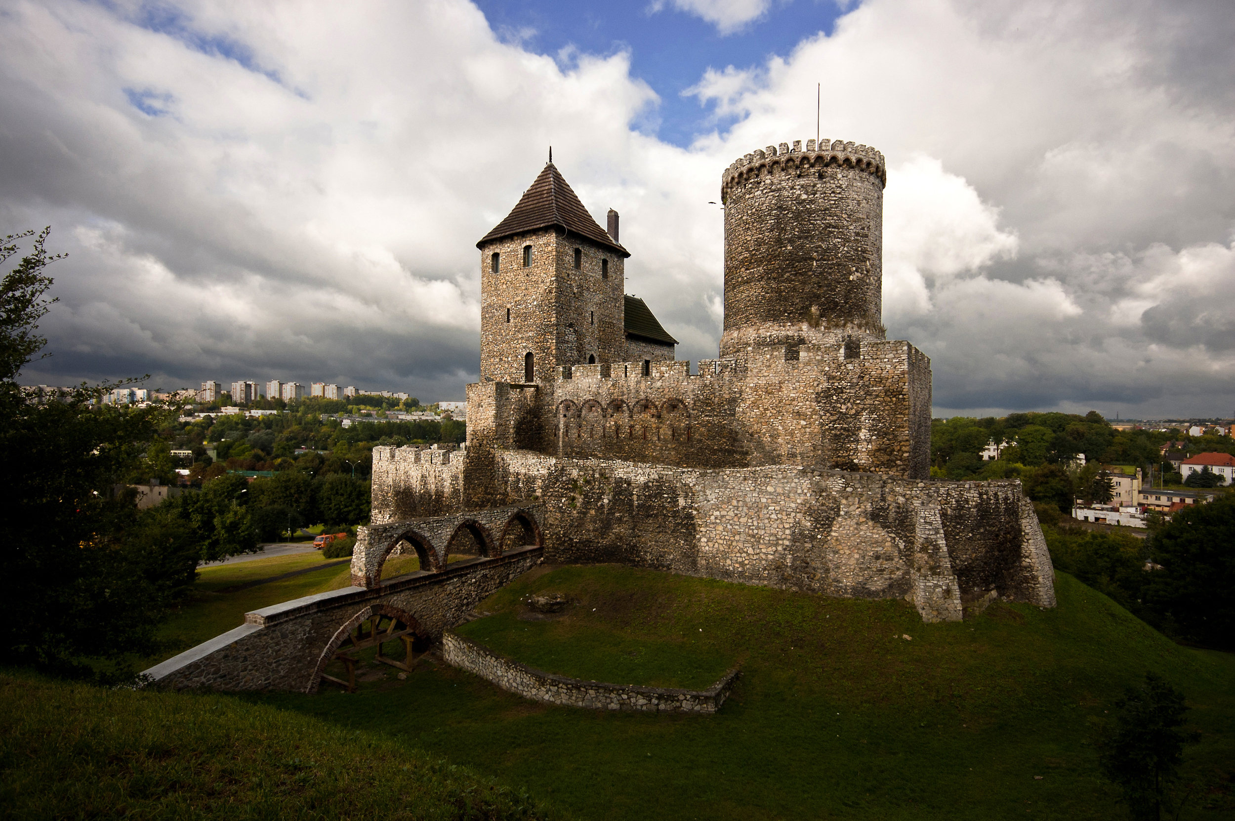 Będzin - zamek obronny z XIV wieku (zabytek nr A 1/60 z 23.02.1960)